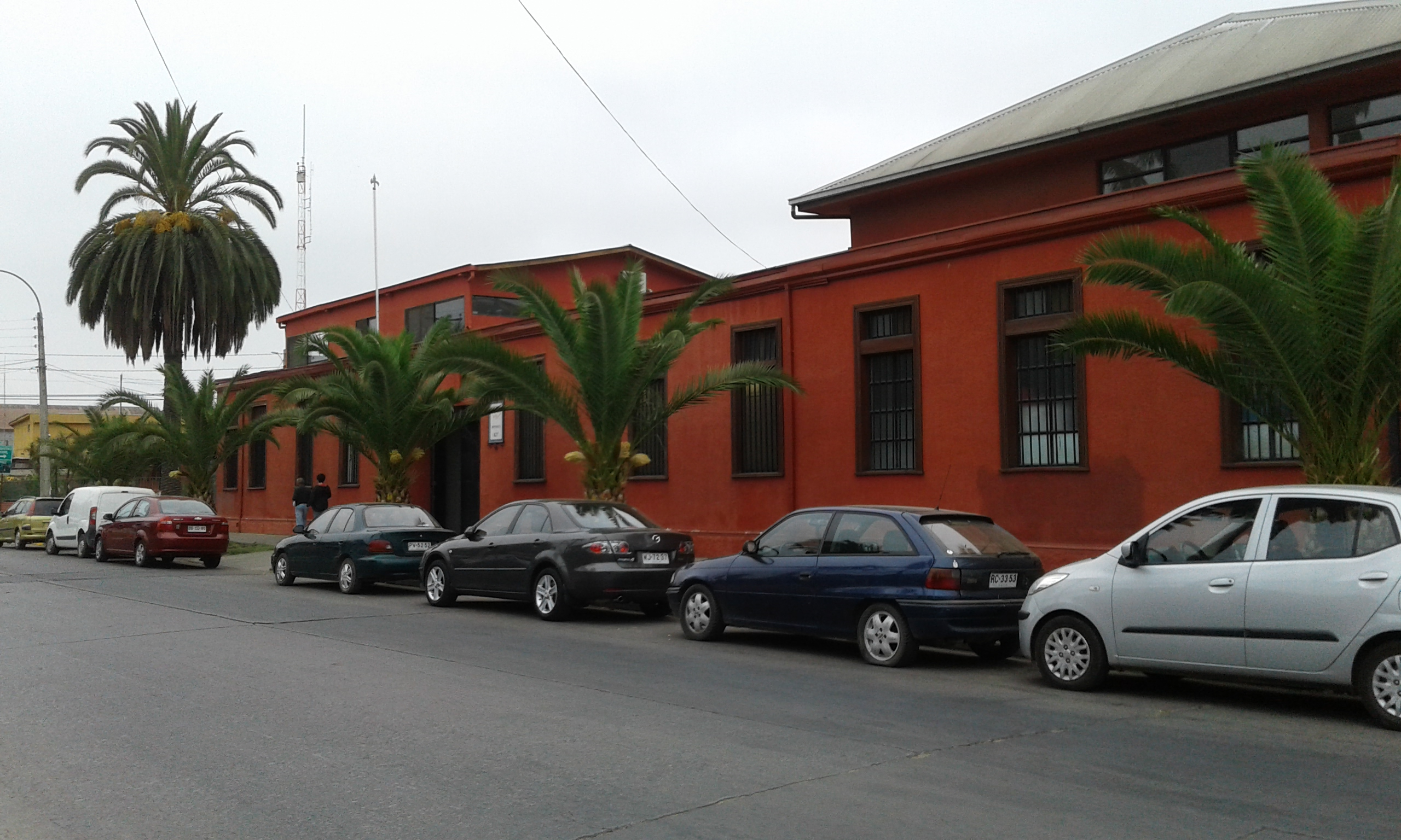 Fábrica Merello en Limache.